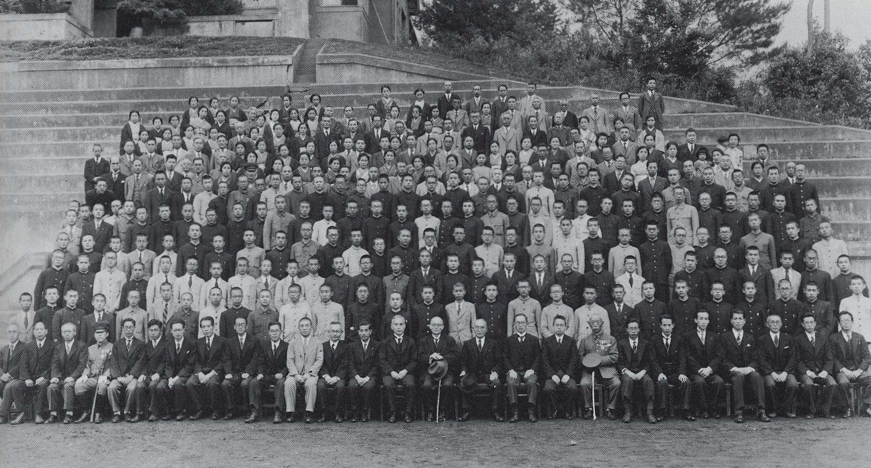 昭和17年6月8日、入学当日の興亜工業大学（千葉工業大学）第一回入学生の記念写真